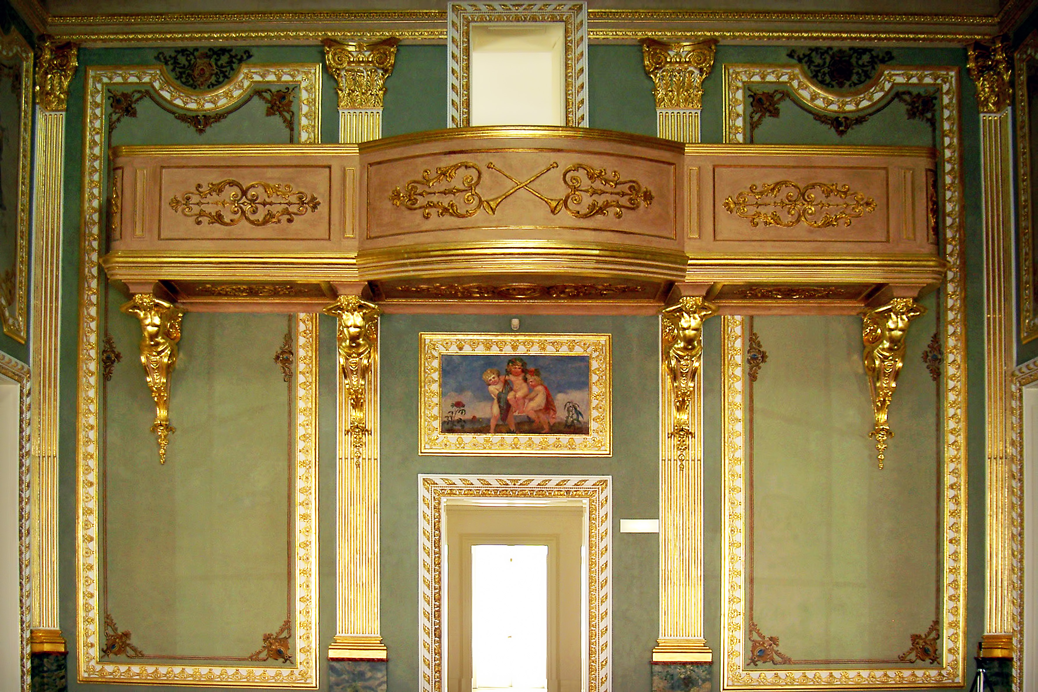 Palácio do Freixo This file was uploaded for Wiki Loves Monuments in Portugal with the unique identifier 70403.